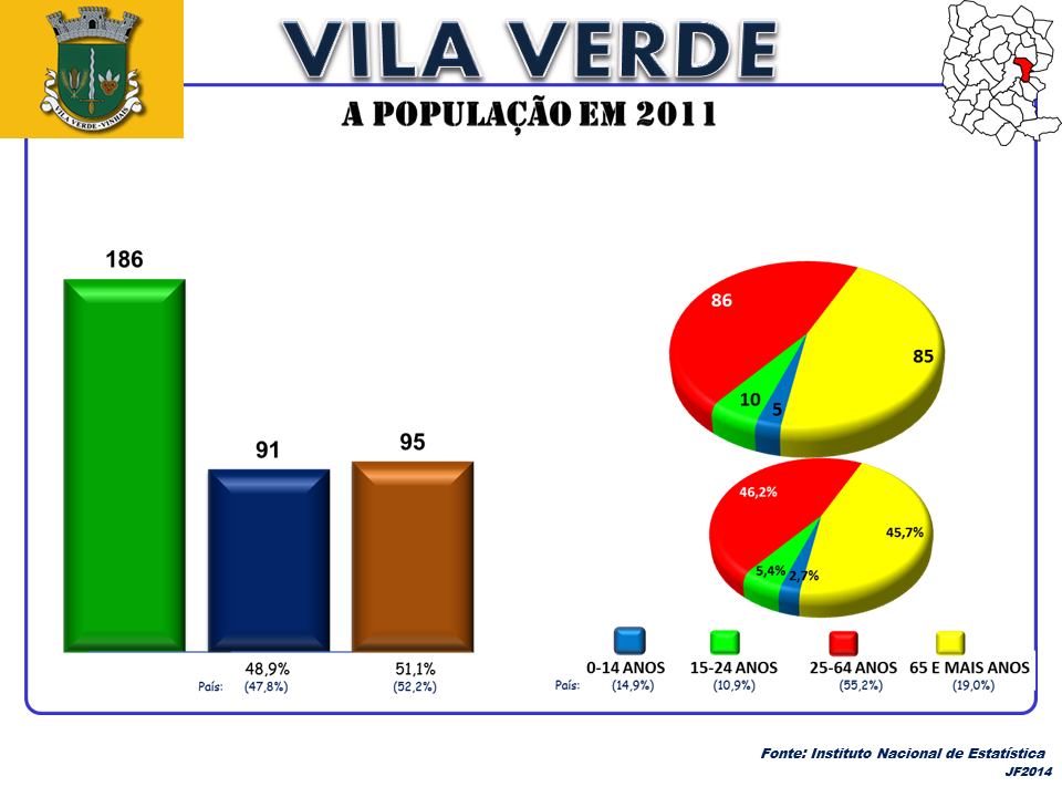 A População em 2011